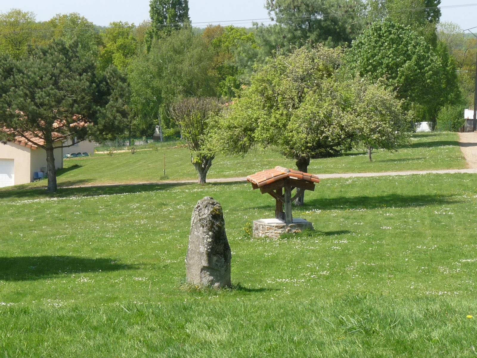 Jardin public derrière l'église de St-Christophe, Charente, France